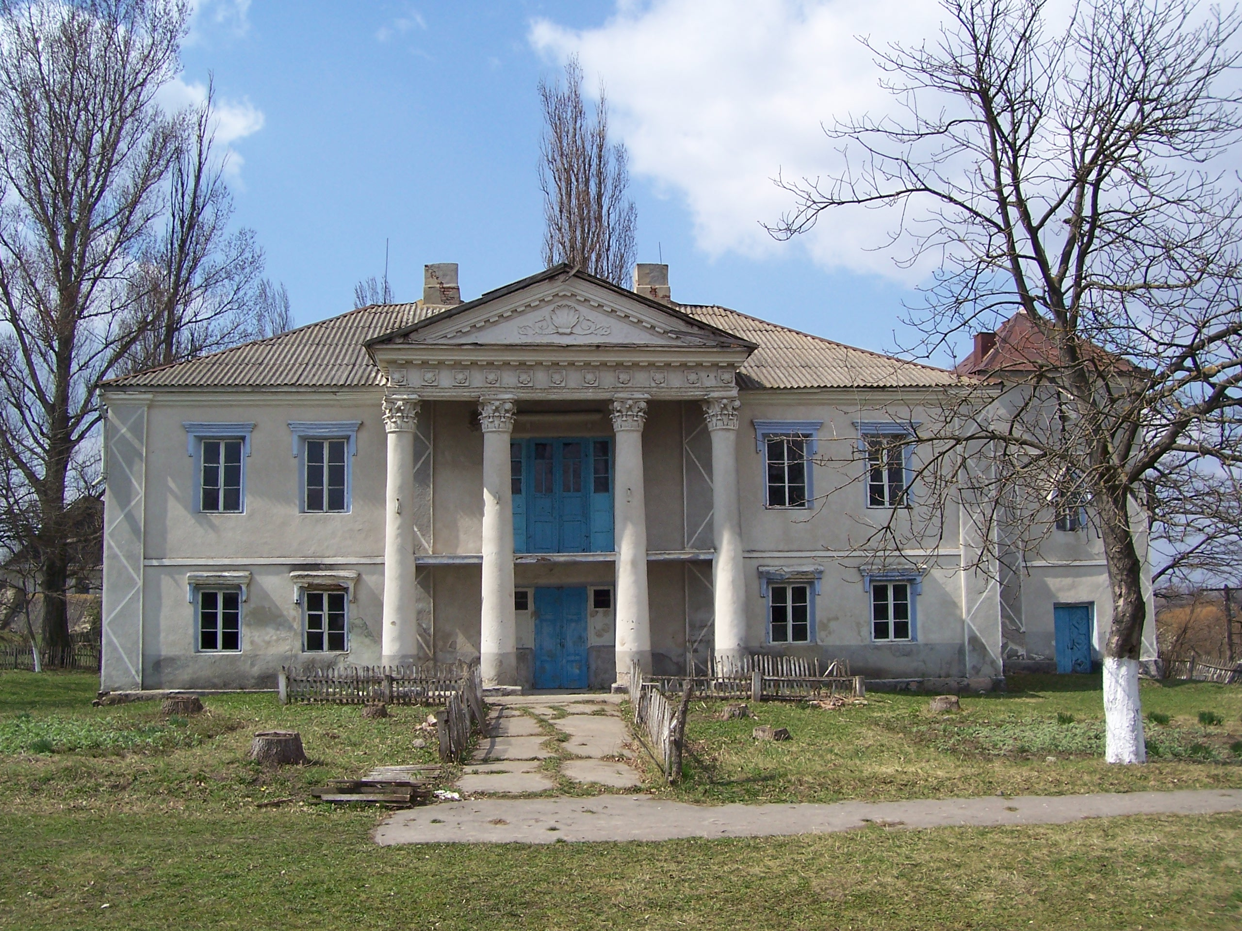 Палац (мур.), нині середня школа, село Жищинці